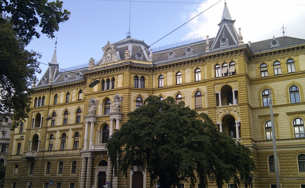 Landesgericht, ehem. Civil-Justizpalast, Marburger Kai 49, Graz